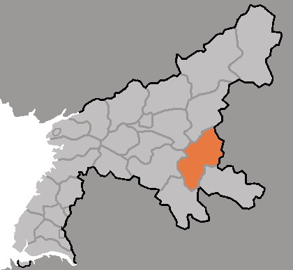 Map of Sinyang, Pyongan-namdo, DPRK, 2006